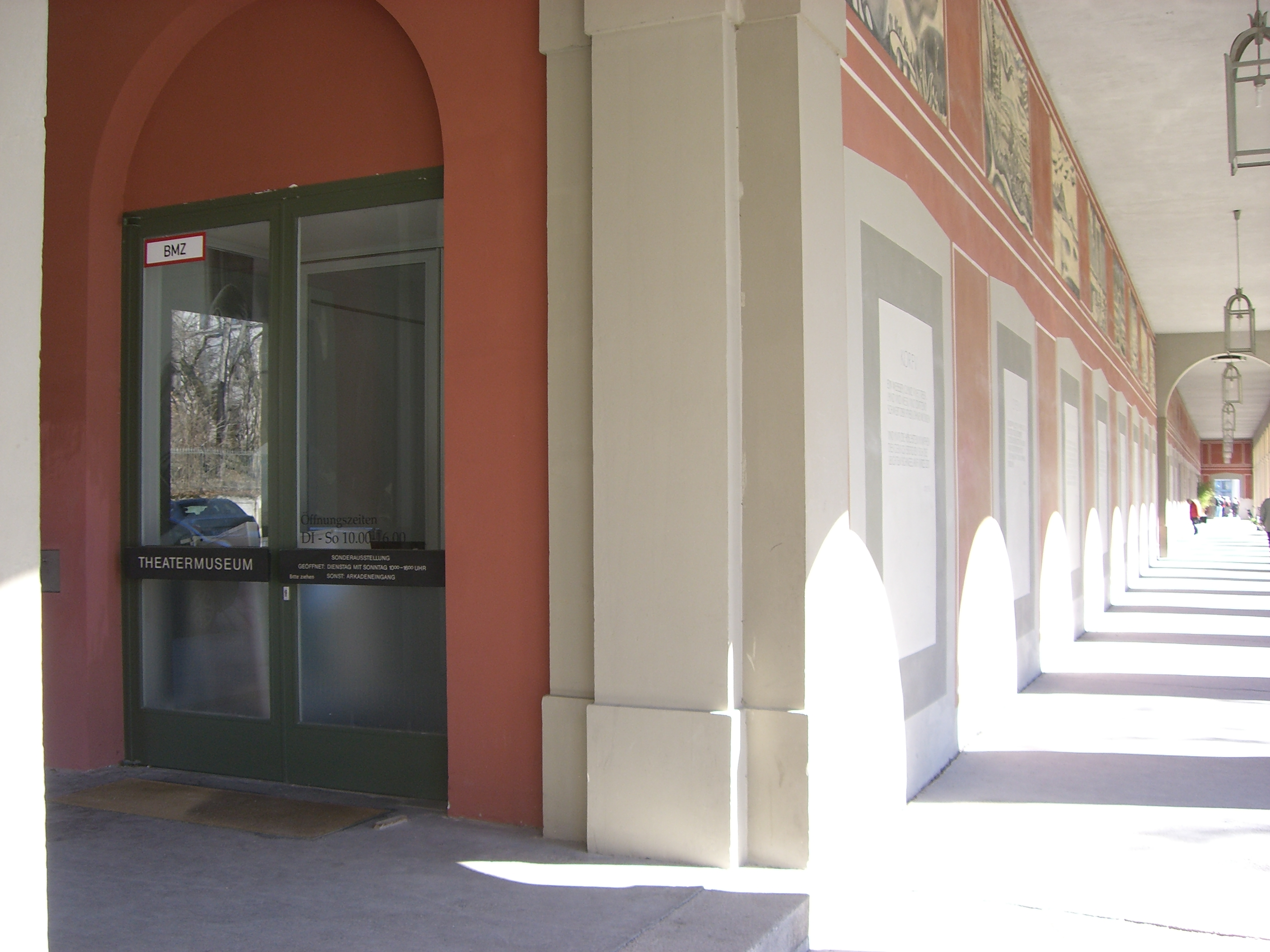 Theatermuseum (Ansicht mit Hofgartenarkaden)